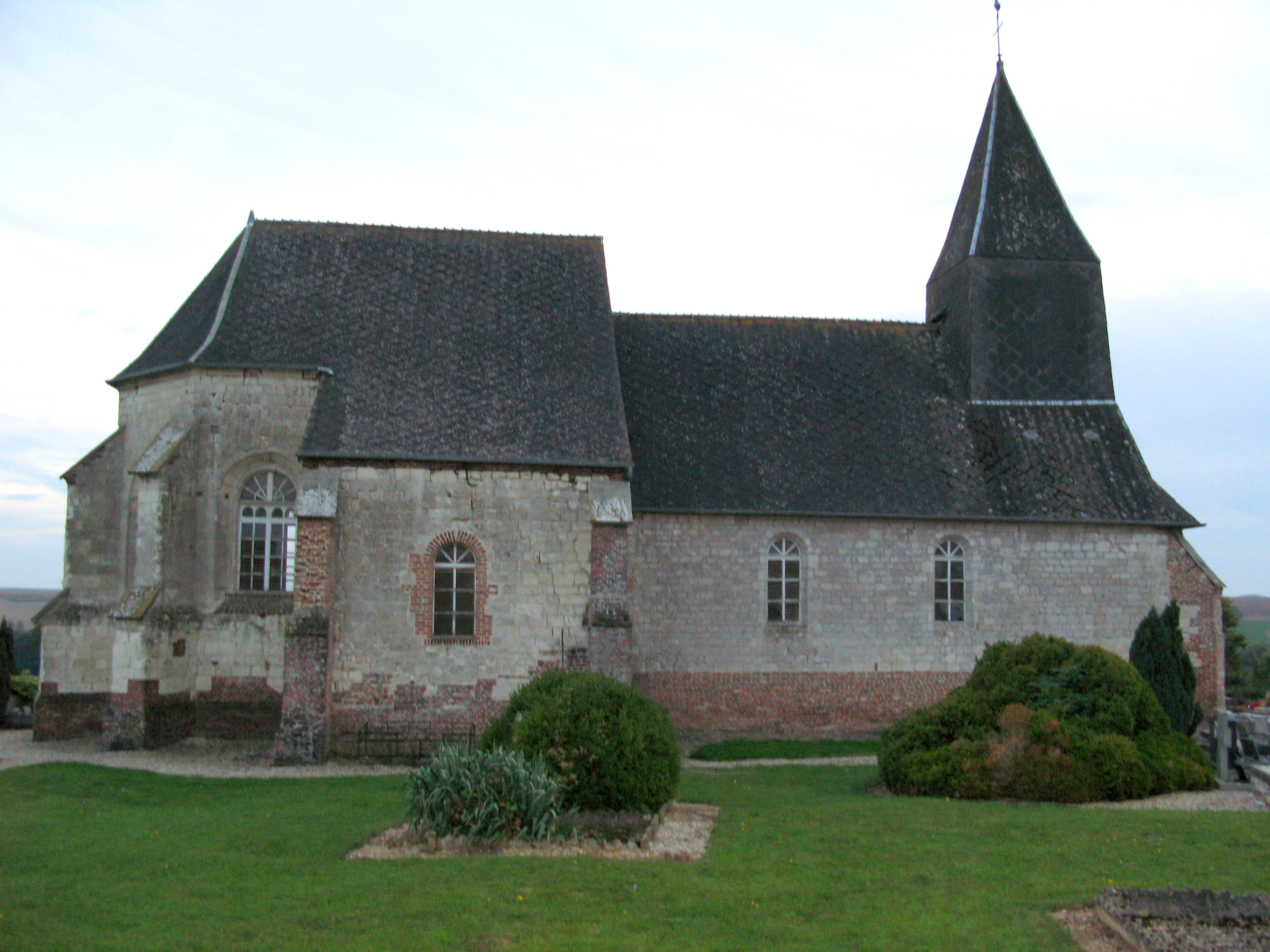 Berlise (Aisne, France) - La façade Nord de l'église fortifiée.